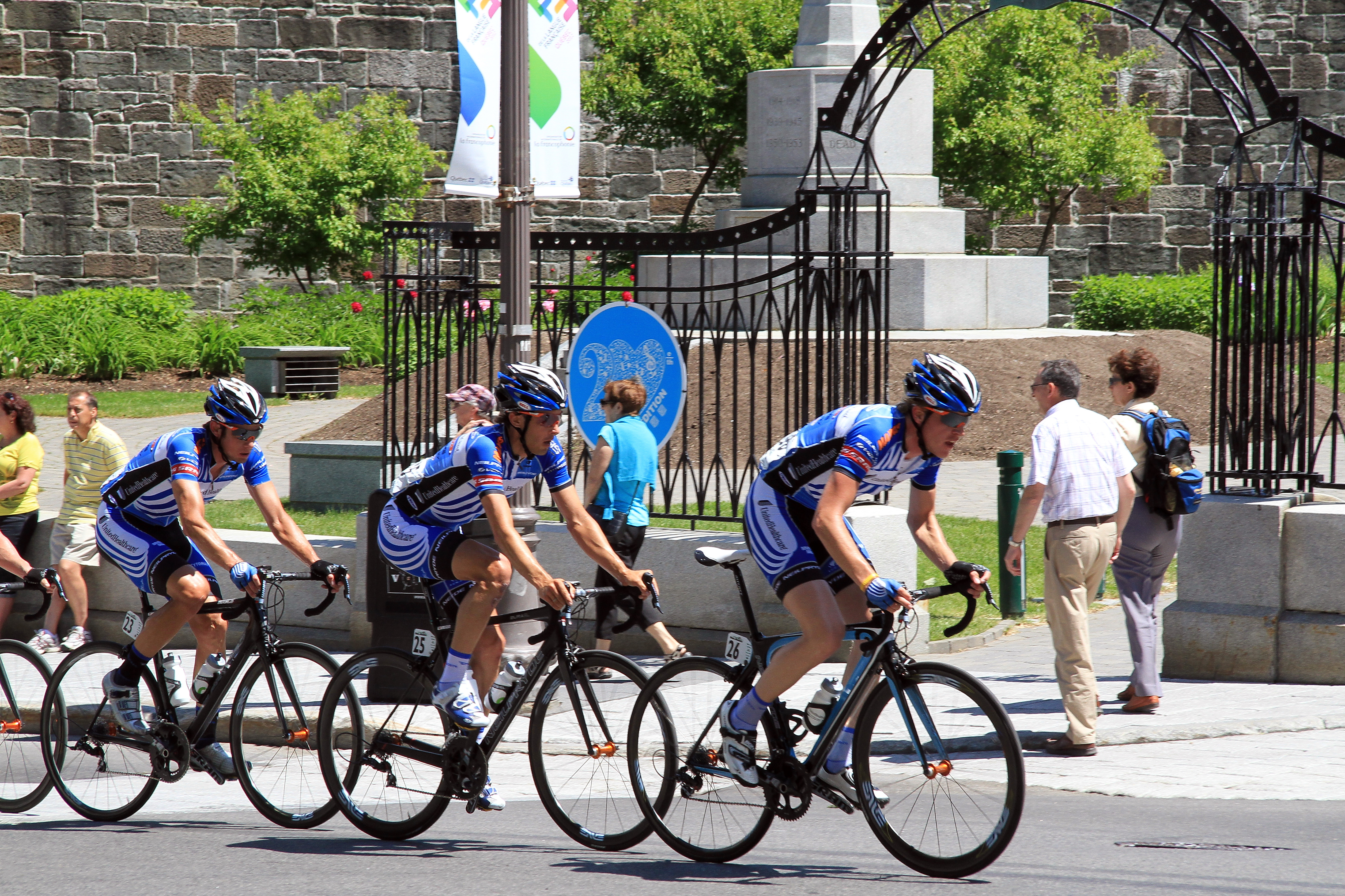 Québec - Grande-Allée Tour Cycliste